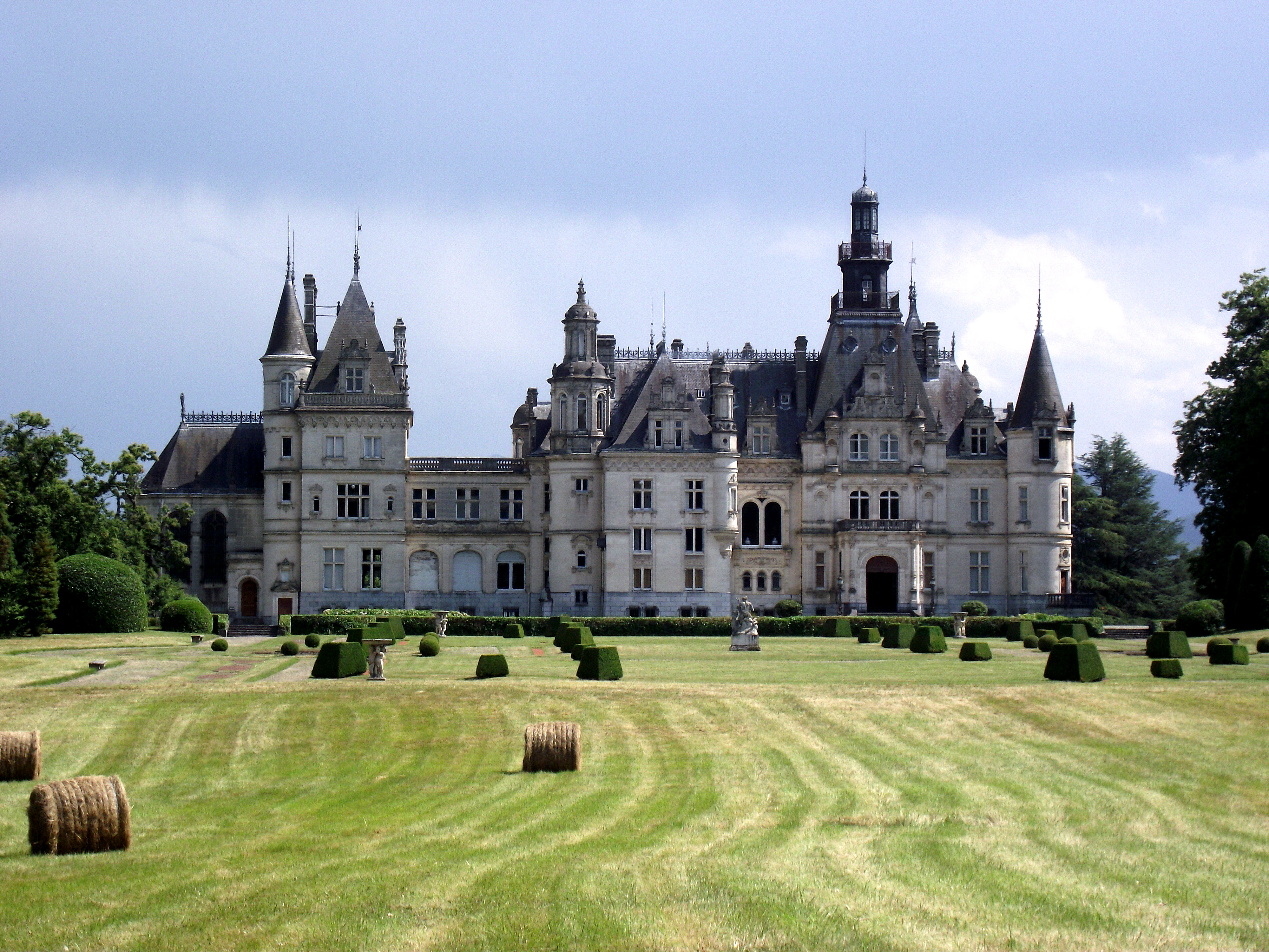 Château de Valmirande (Montréjeau, Haute-Garonne, France)